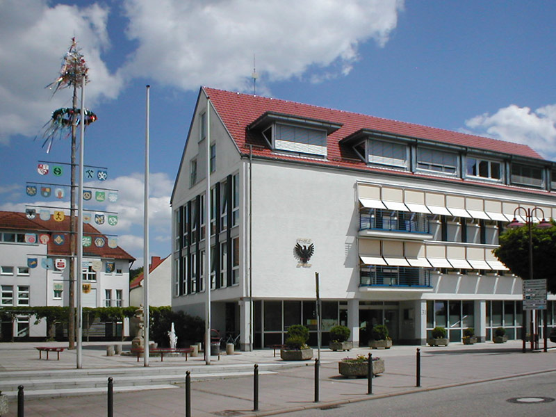 Rathaus von Waibstadt